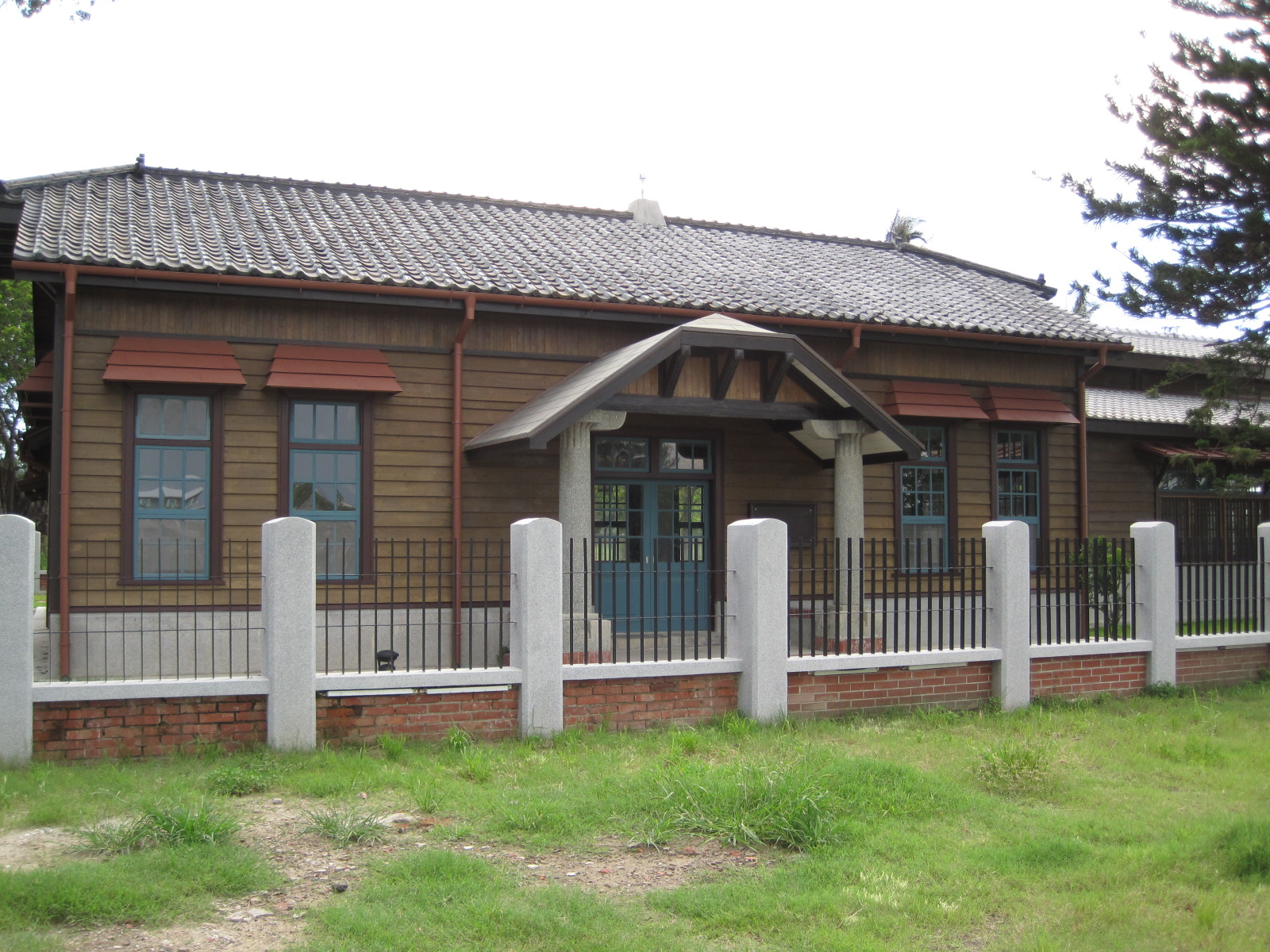 臺南市市定古蹟